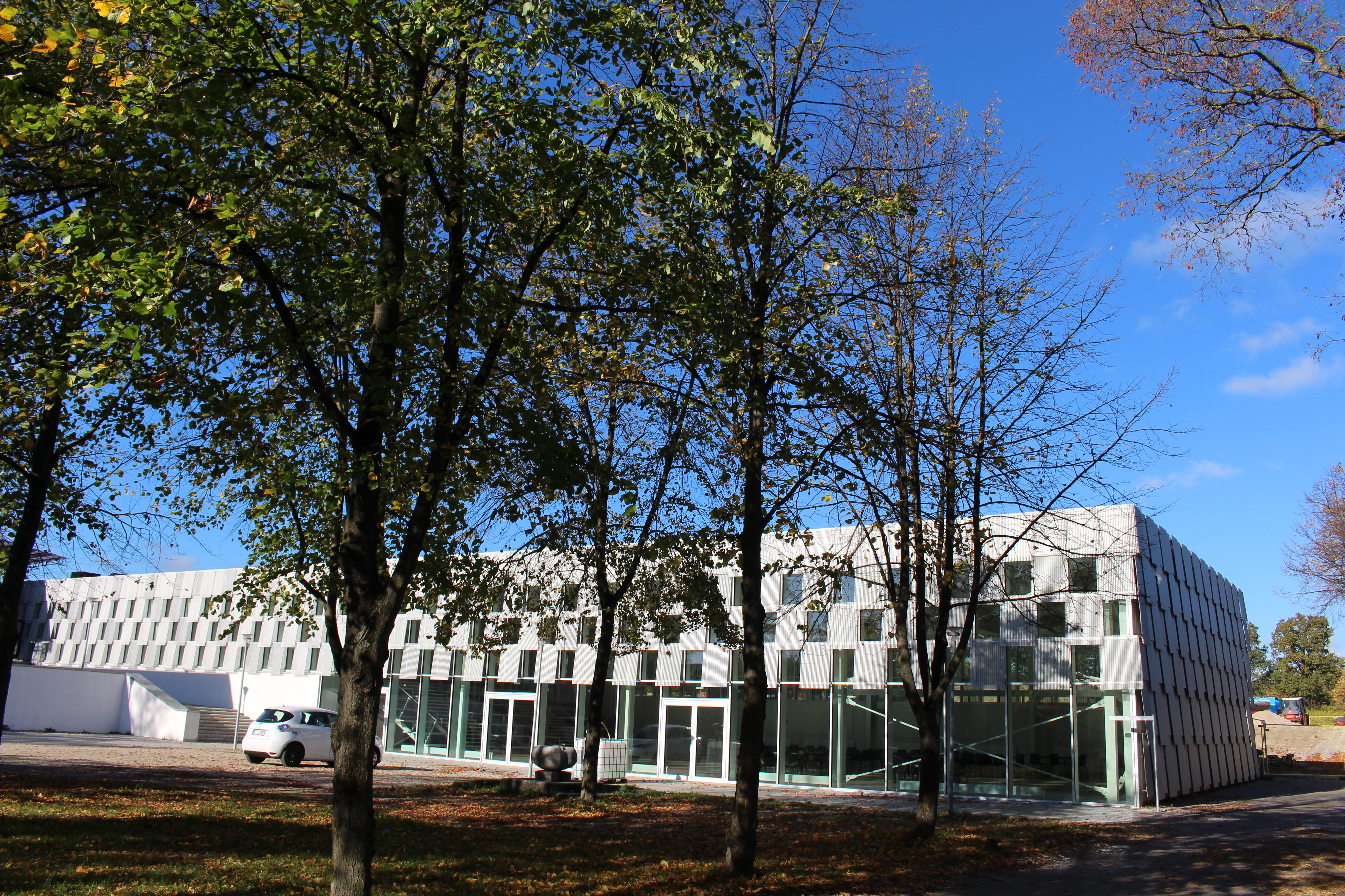 Kongsholmcentret i Albertslund